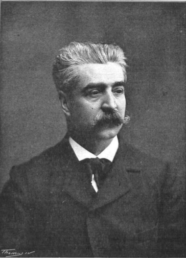 Francesch de Bofarull y Sans